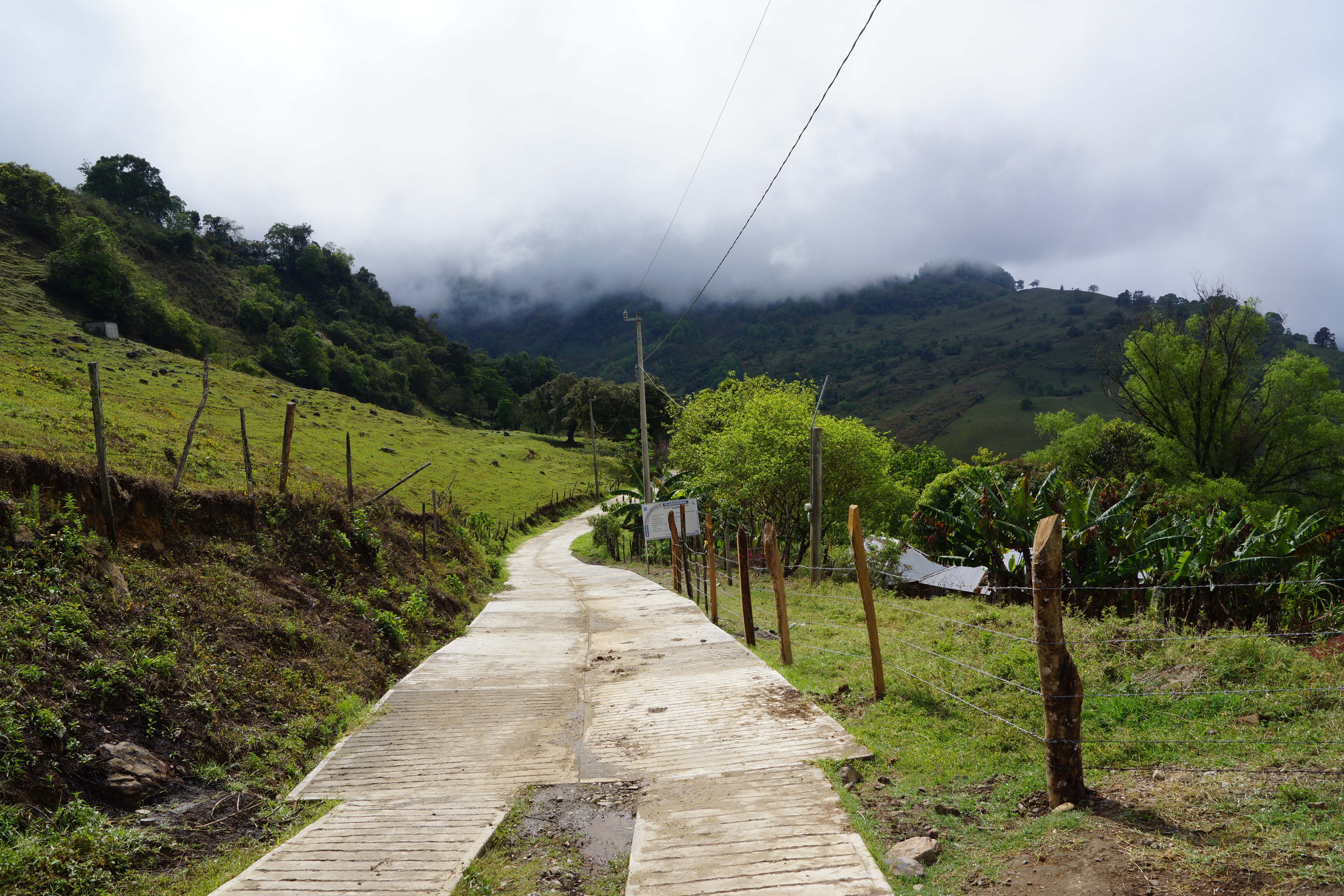 La comunidad de Xitlama, ubicada en una pendiente de un valle, tiene caminos pavimentados incompletos dado que no cuentan con ls recursos para completar el largo camino que toma para ir a sus milpas o a Tlanchinol.